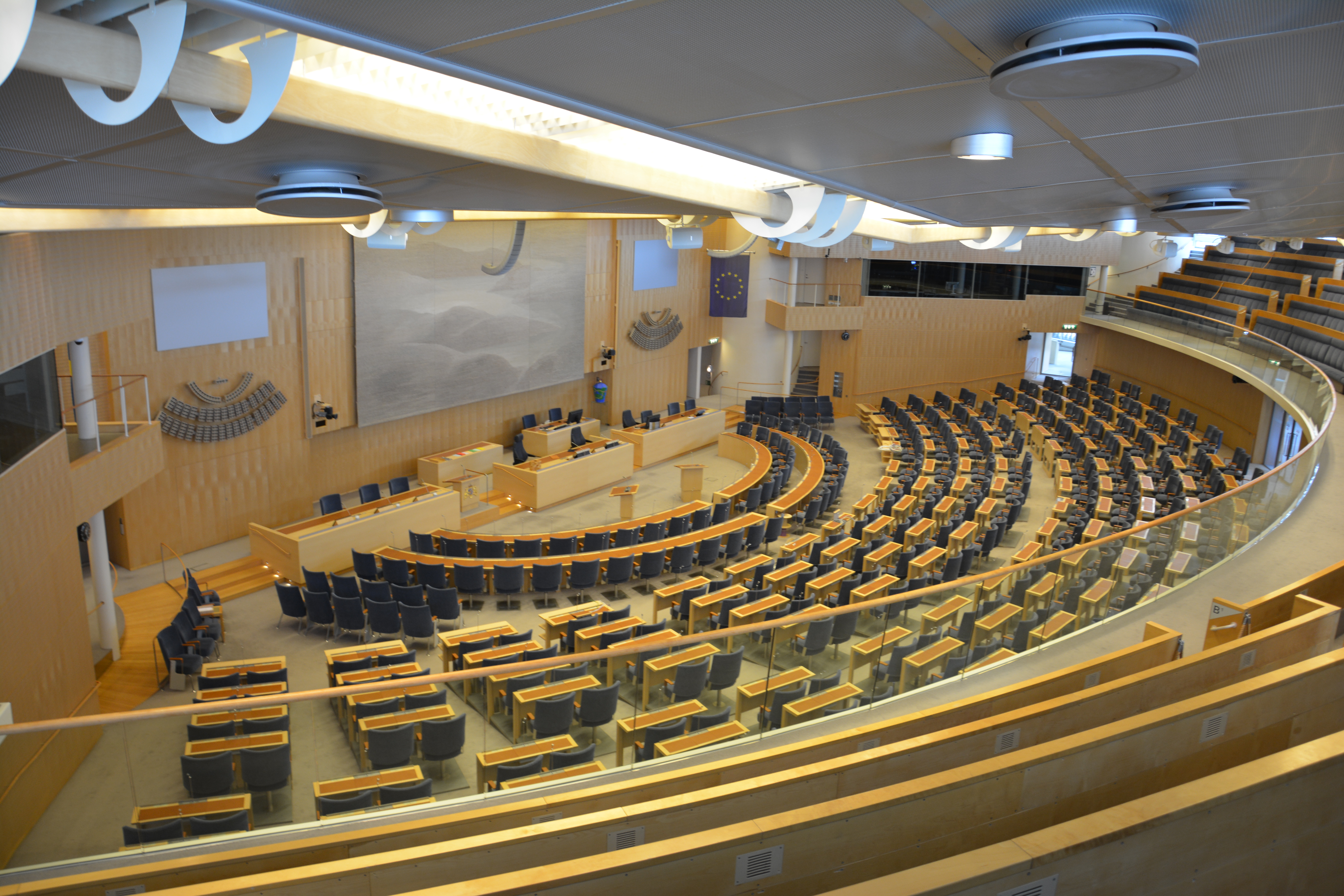 Zweedse Parlement